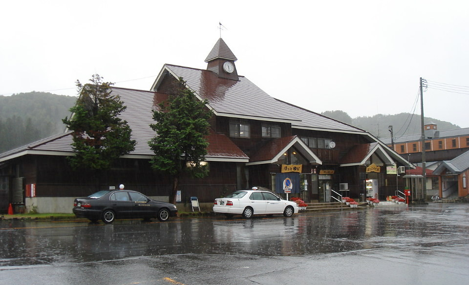 北上線ほっとゆだ駅・駅舎 （改札口は向かって右の出入口。中央に見える出入口は温泉のもの） 投稿者↑PON（ウエポン）が2006年10月7日にほっとゆだ駅前の観光案内所より撮影。 サイズ変更・トリミングの上、2006年12月3日に差し替え。 ※雨天時に撮影した画像なので、晴天時に撮影した良好な画像があれば、どうぞ差し替えて下さい。